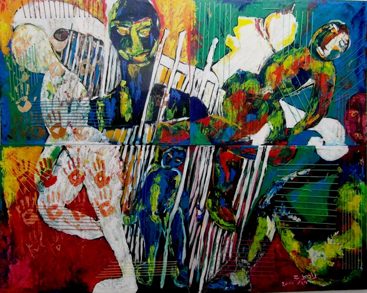 על מיתר - אקריליק על עץ - 2014